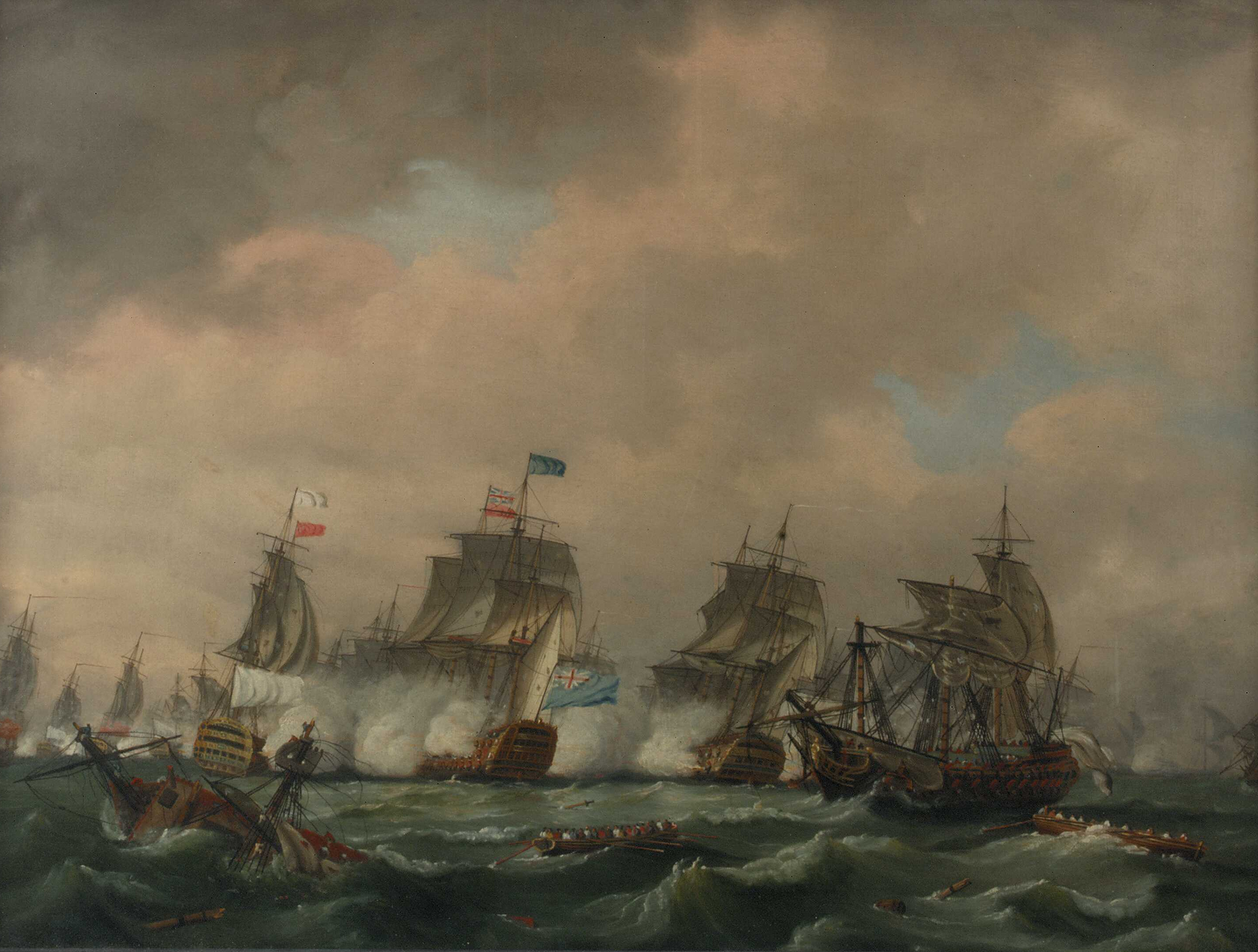 Vue générale de la bataille des Cardinaux, le 20 novembre 1759, au large des côtes bretonnes. A droite : représentation possible du vaisseau français le Héros désemparé. Plus loin au centre : les vaisseaux amiraux anglais et français au combat.